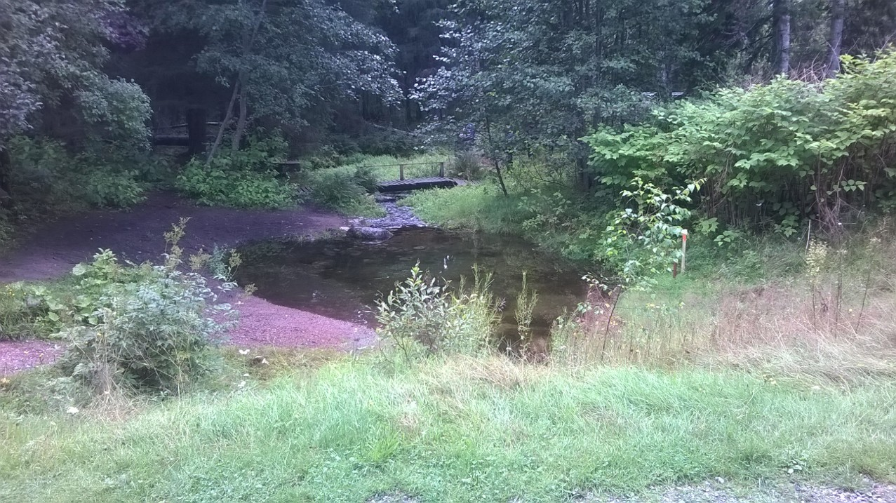 Kuninkaanlähde kankaanpäässä Elokuussa 2016.